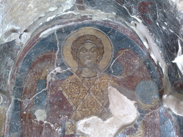 Τοιχογραφία στο ξωκλήσι Αγίου Γεωργίου